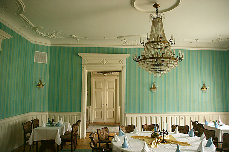 Dawny salon w pałacu w Kobylnikach